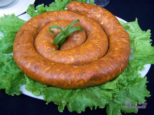 La salchicha Huachana es el plato representativo de la ciudad, muy conocida en la gastronomía del Perú, y utilizada proncipalmente en el desayuno.